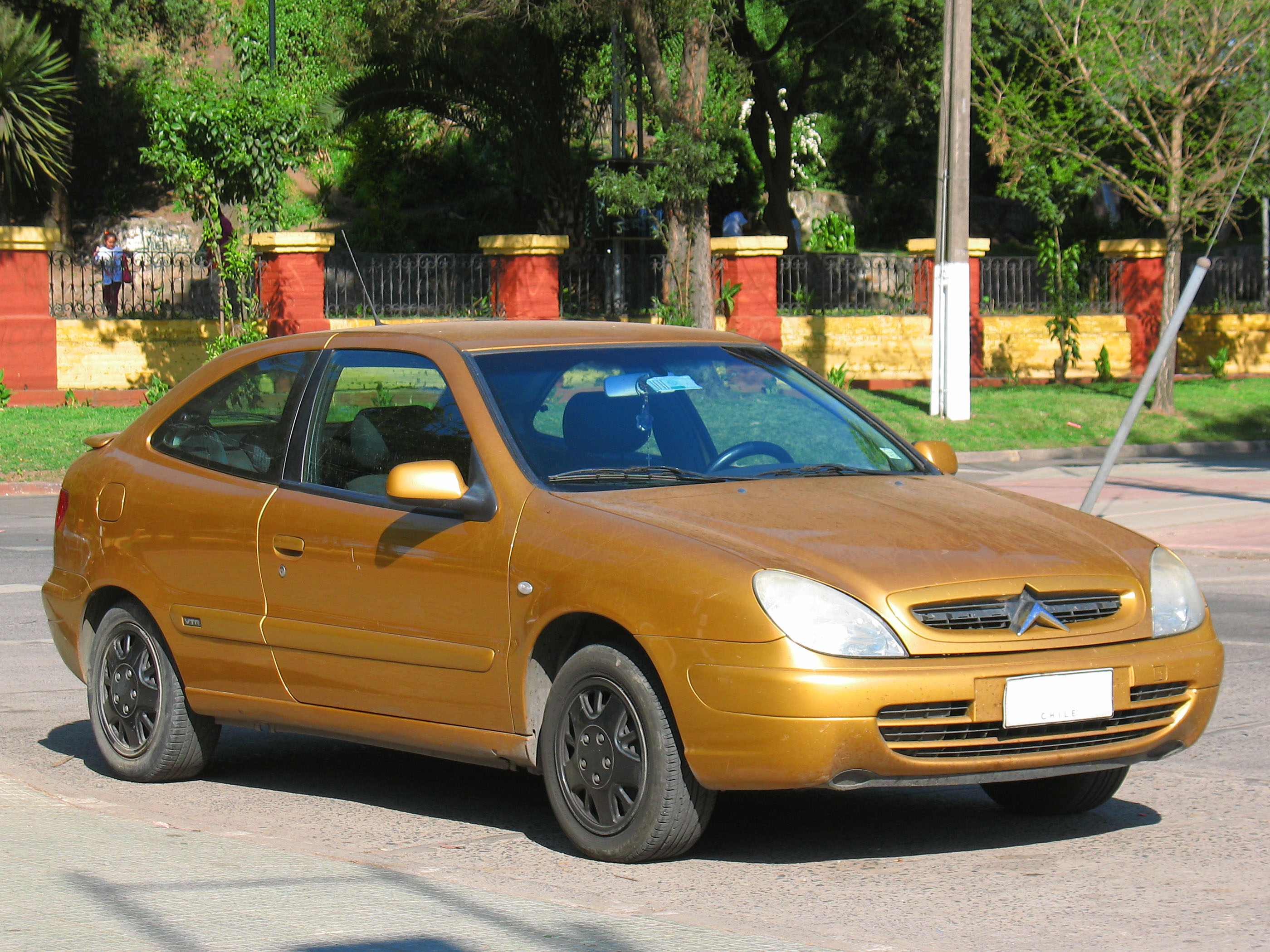 Citroen Xsara VTR 1.6 2002